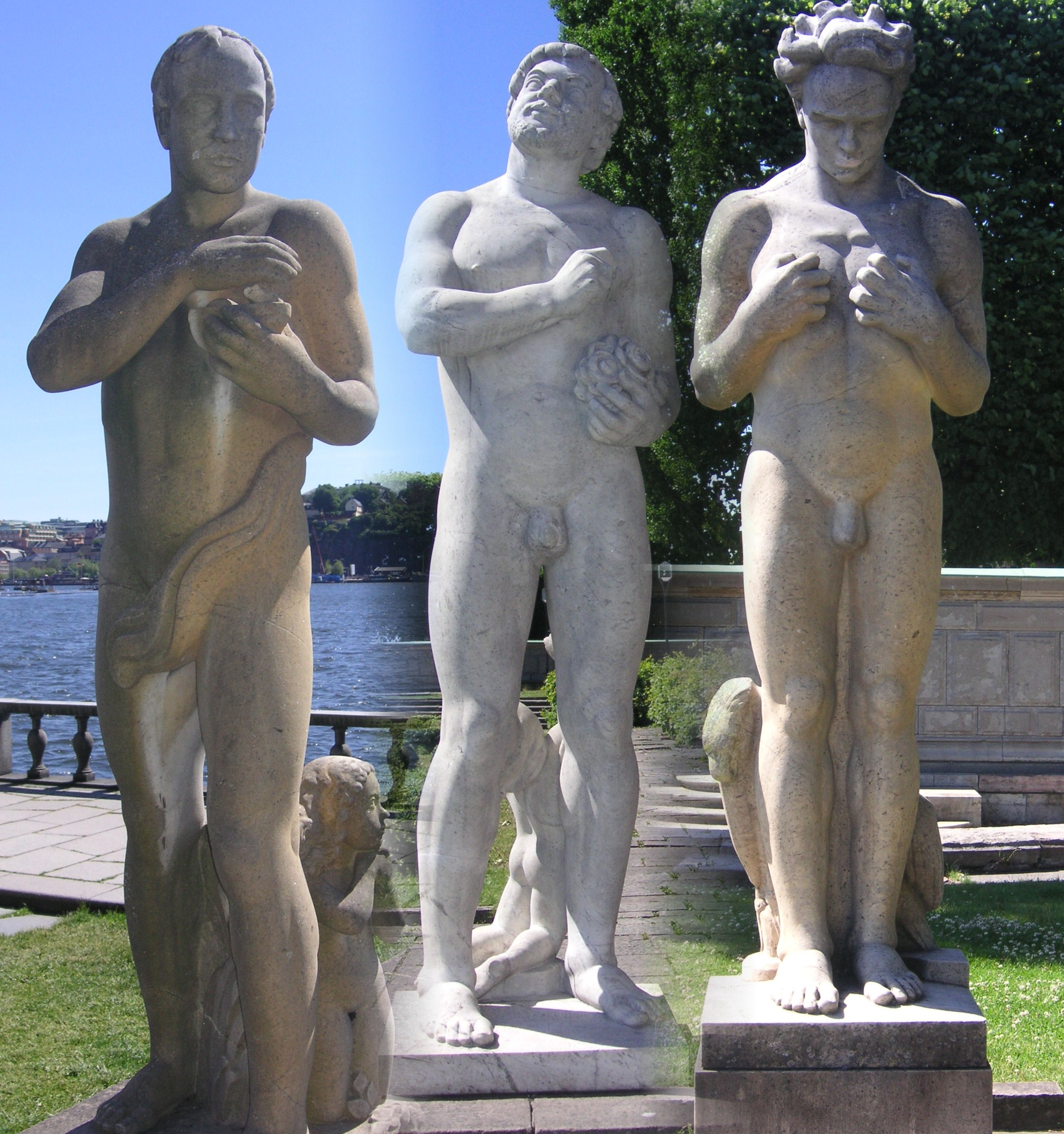 Carl Elds: Fröding, Josephson och Strindberg, Fotomontage